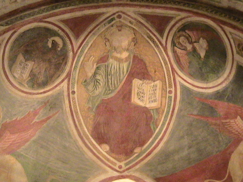 Pieve di Santa Maria Assunta affreschi